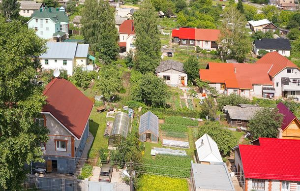 Переулок Котельный (Кирово-Чепецк)